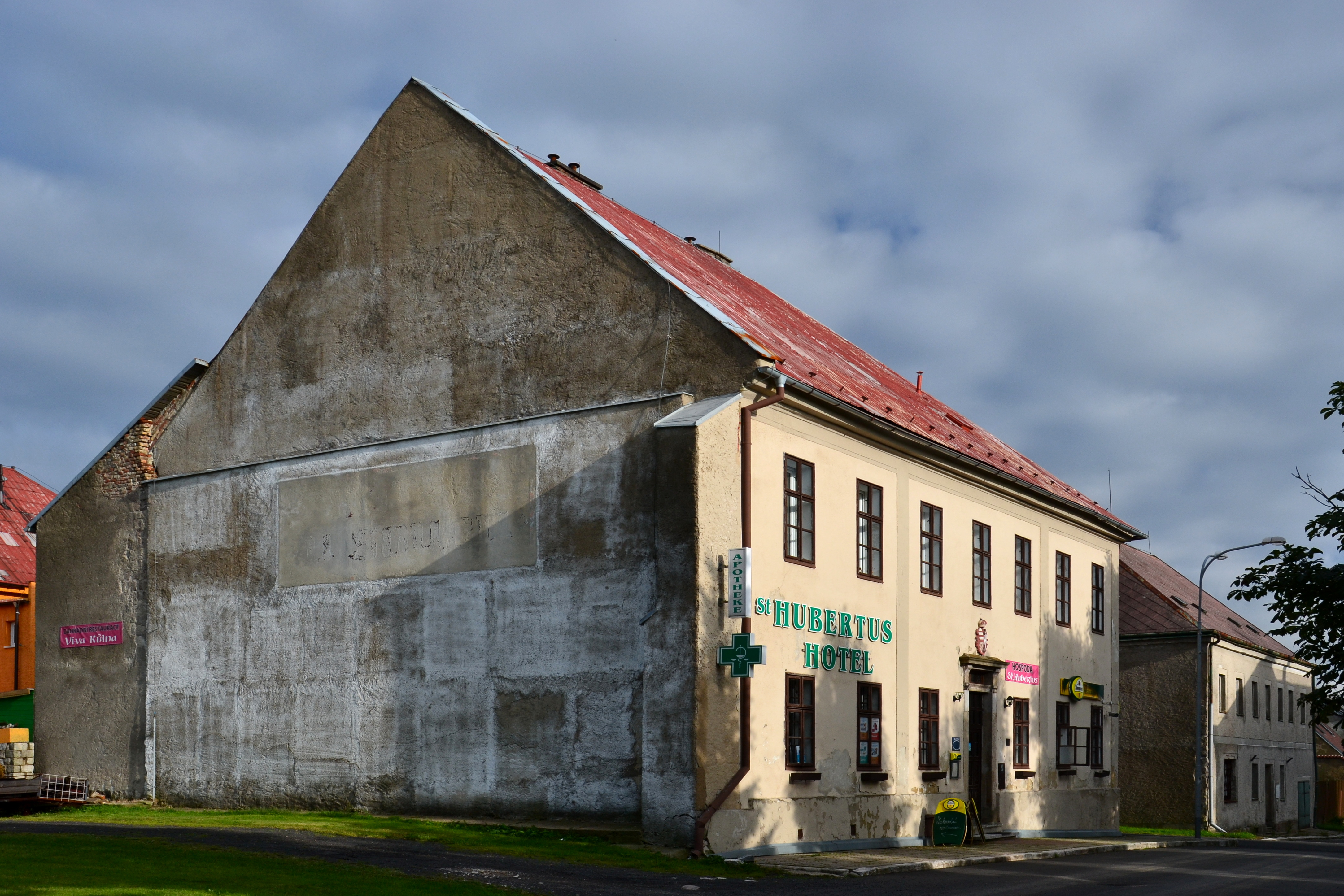 Radnice (Hora Svatého Šebestiána), Hora Svatého Šebestiána 2